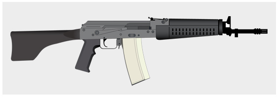 Vectorgrafik des Wieger STG 941 / Verkleinerte .jpg-Kopie Andere Versionen: Version 1.0